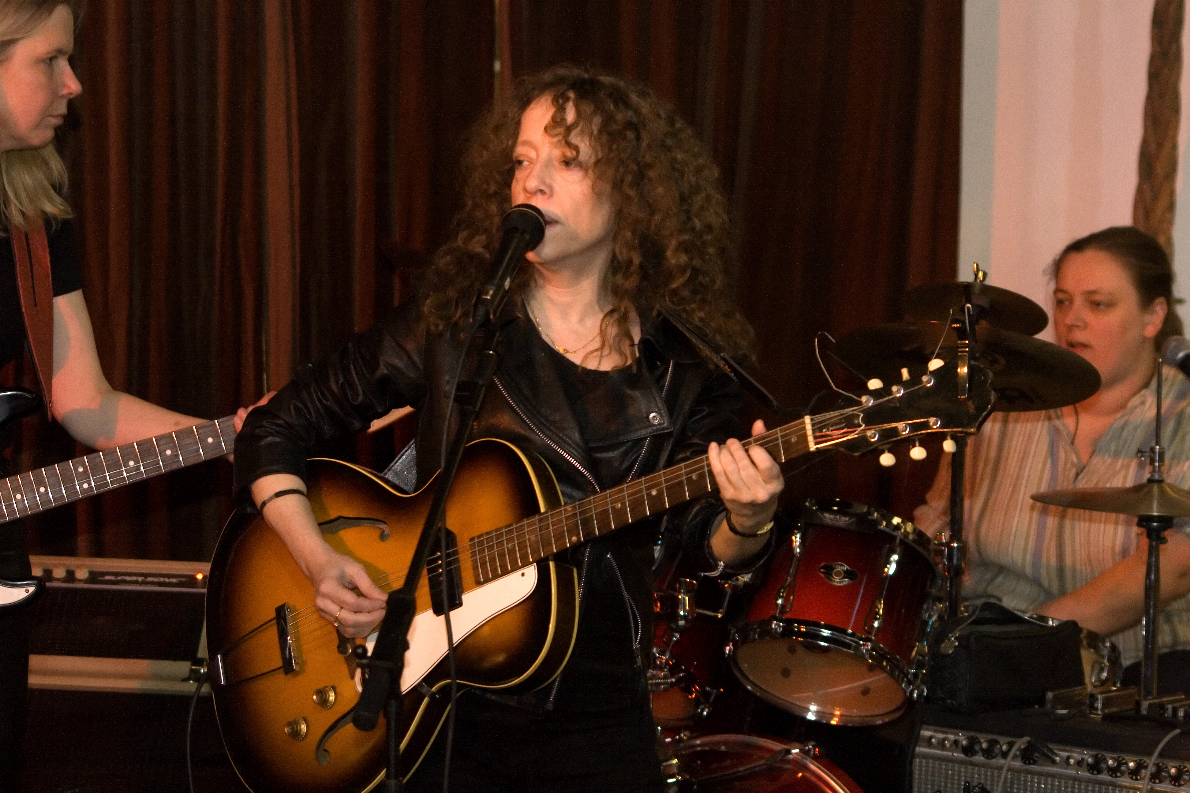 Little Jenny & the Blue Beans lirar häcken av publiken på Lungan i Falkenberg 090221.